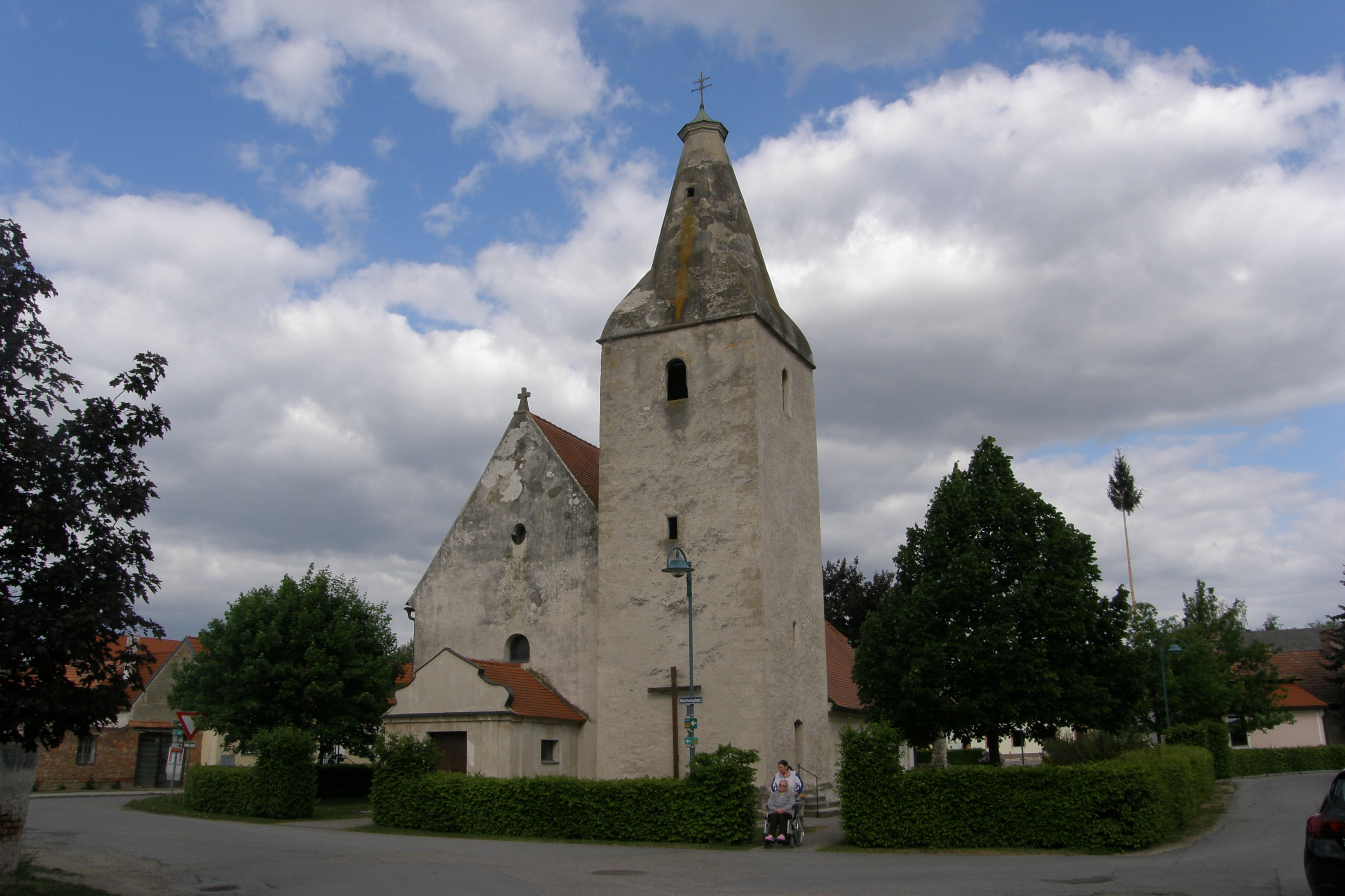 Kath. Pfarrkirche hl. Nikolaus